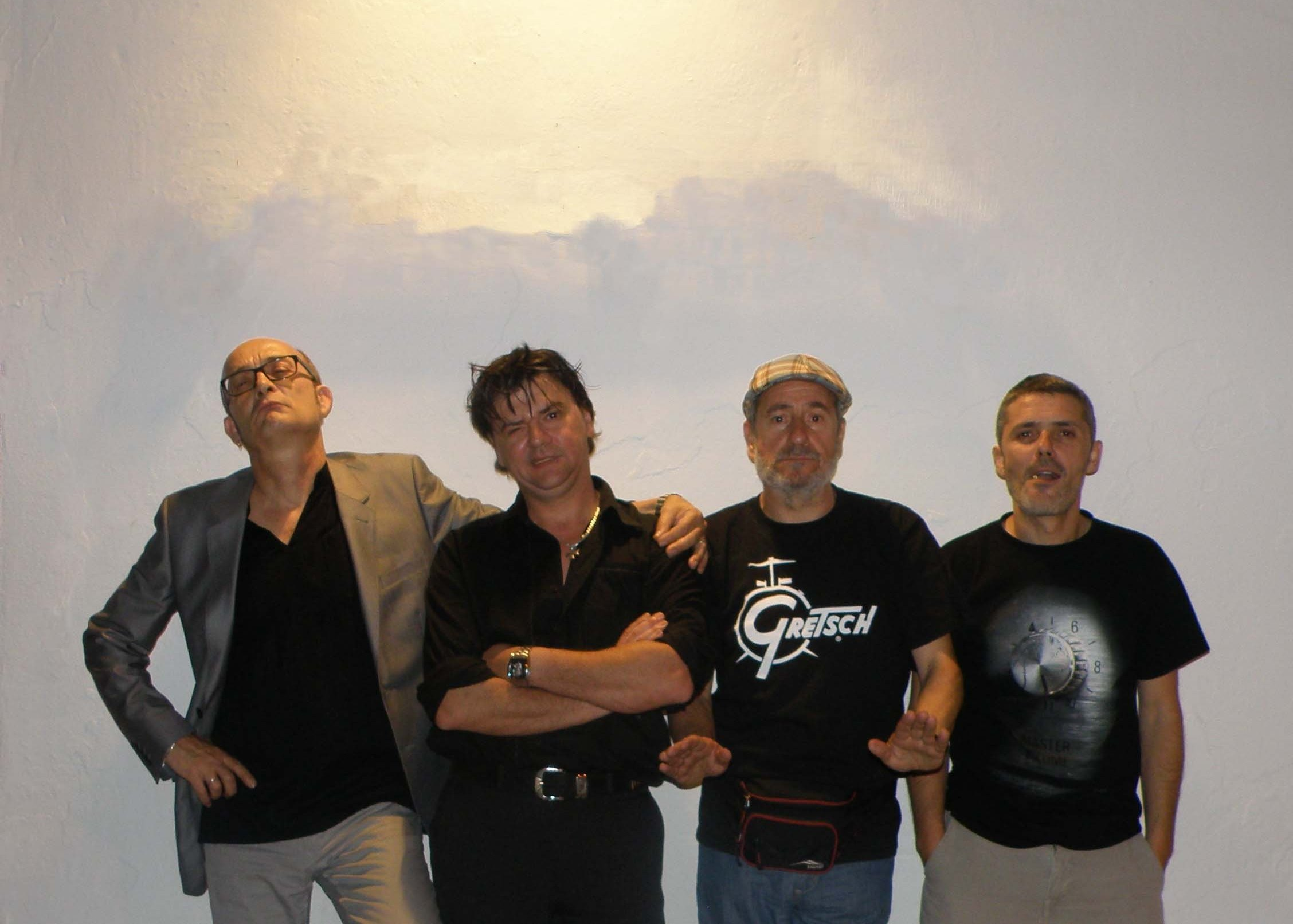 Formación actual de Puretones, con Rafa Ramírez al bajo. Foto: Mª. Teixidor.